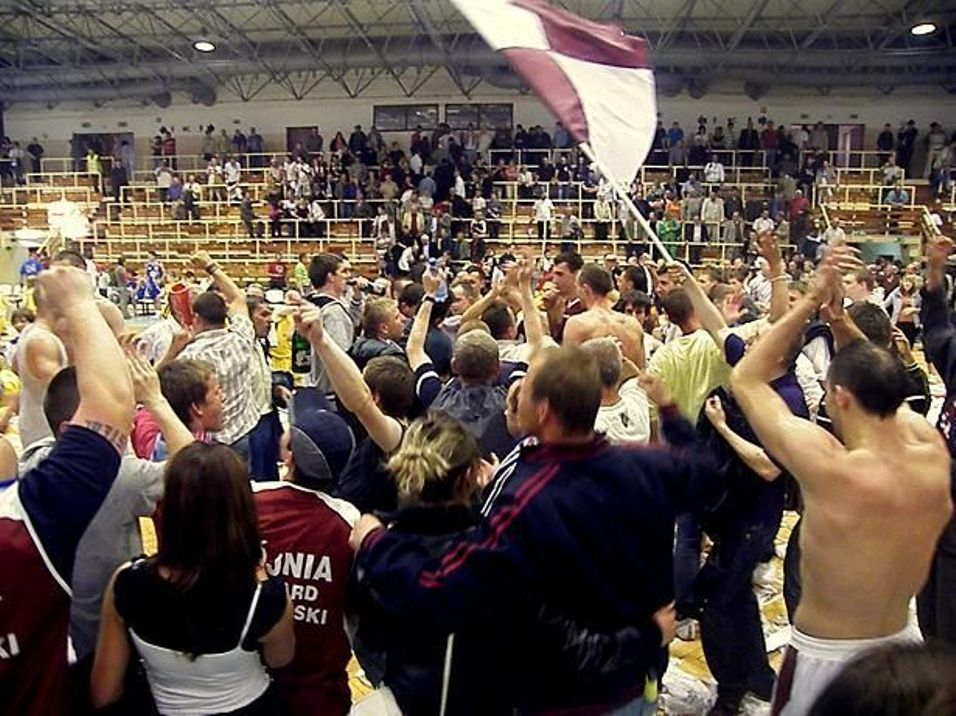 Stargard, 2009r. Spójnia w I lidze